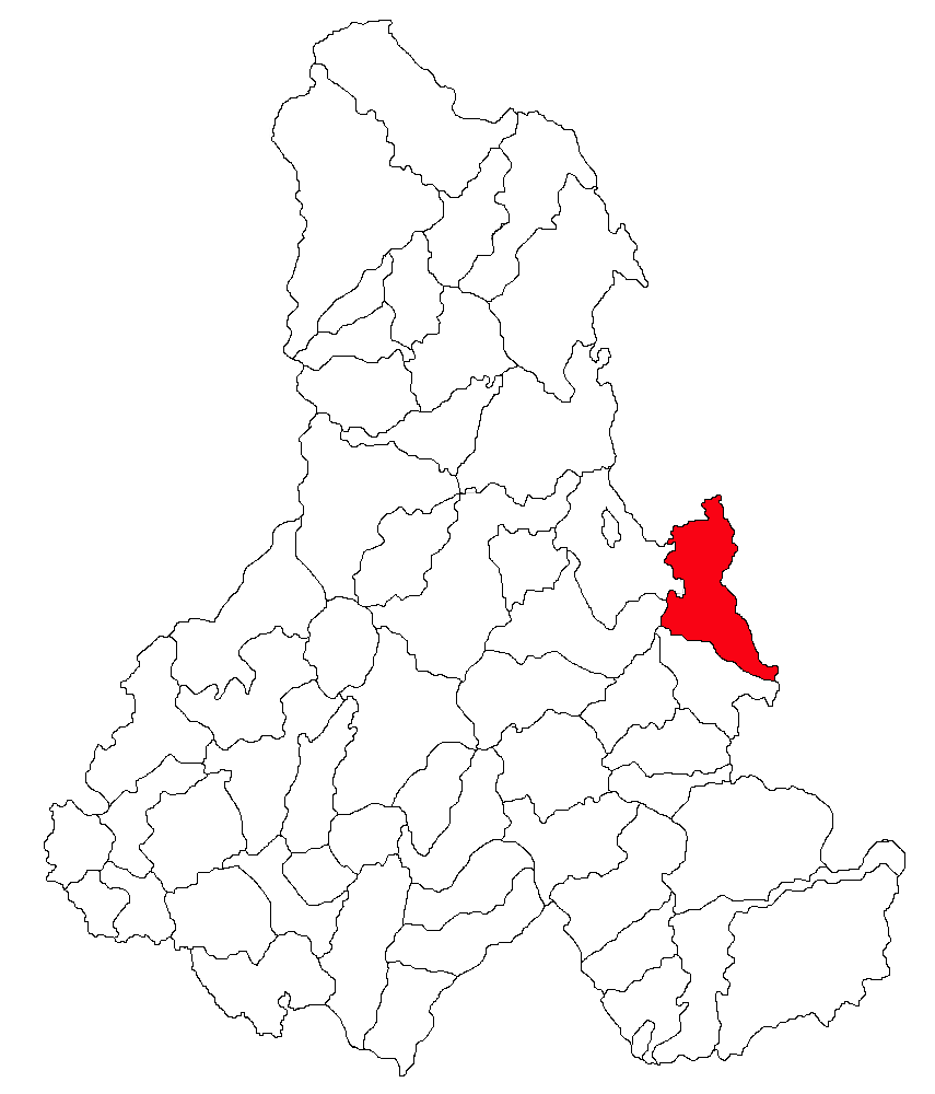 Categorie:Hărţi ale judeţului Harghita Contents 1 Licensing 2 Sursă 3 Licensing 4 Original upload log Licensing Sursă ro::Imagine:Harta_jud_Harghita.png